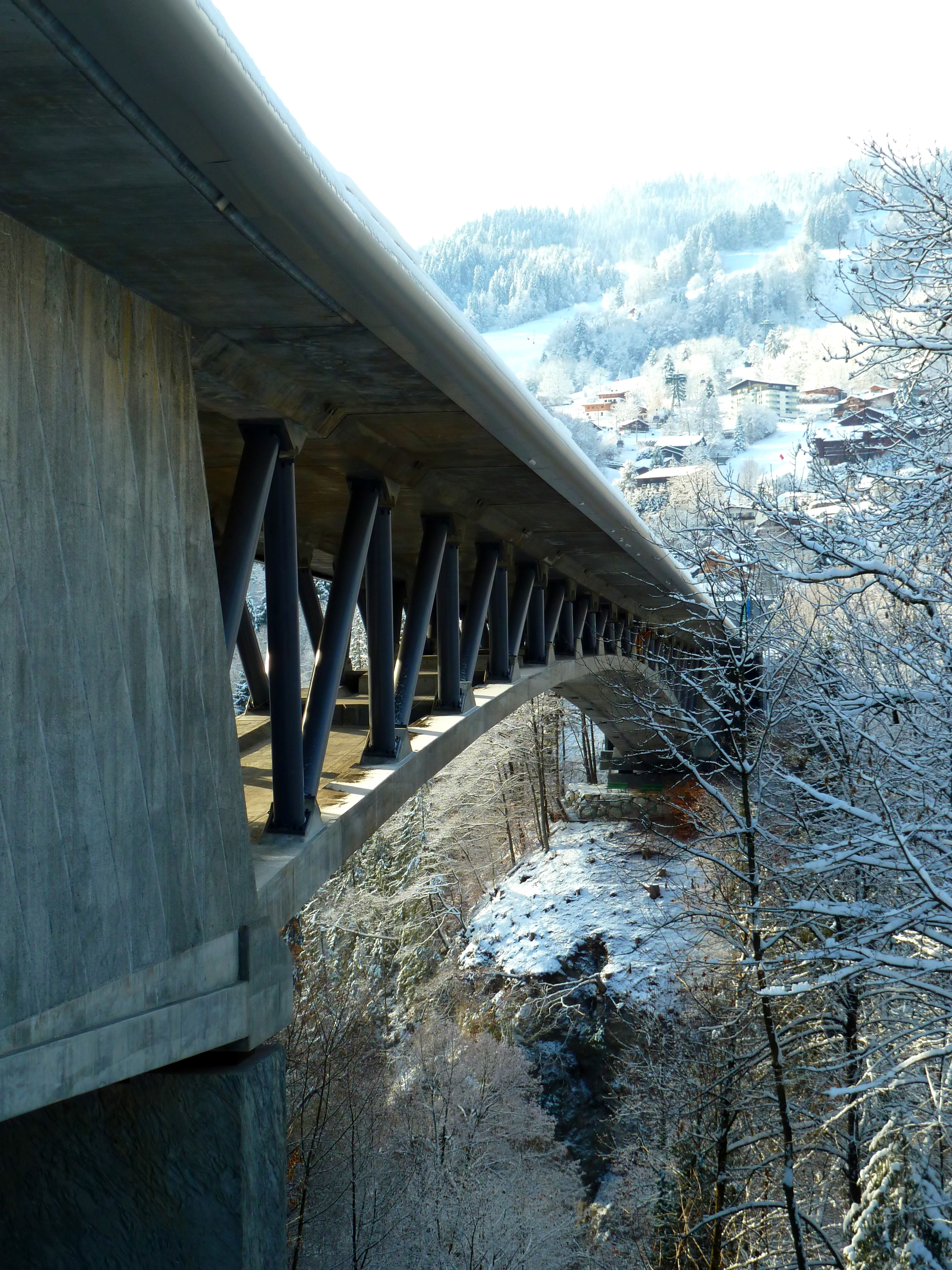 Le pont de Saint-Gervais (Haute-Savoie), inauguré en 2012.